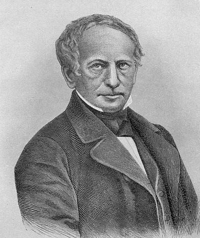 Gottfried Bernhardy (1800–1875), deutscher klassischer Philologe. Stich nach einer Originalfotografie aus Volckmann, Gottfried Bernhardy, E. Anton, Halle.